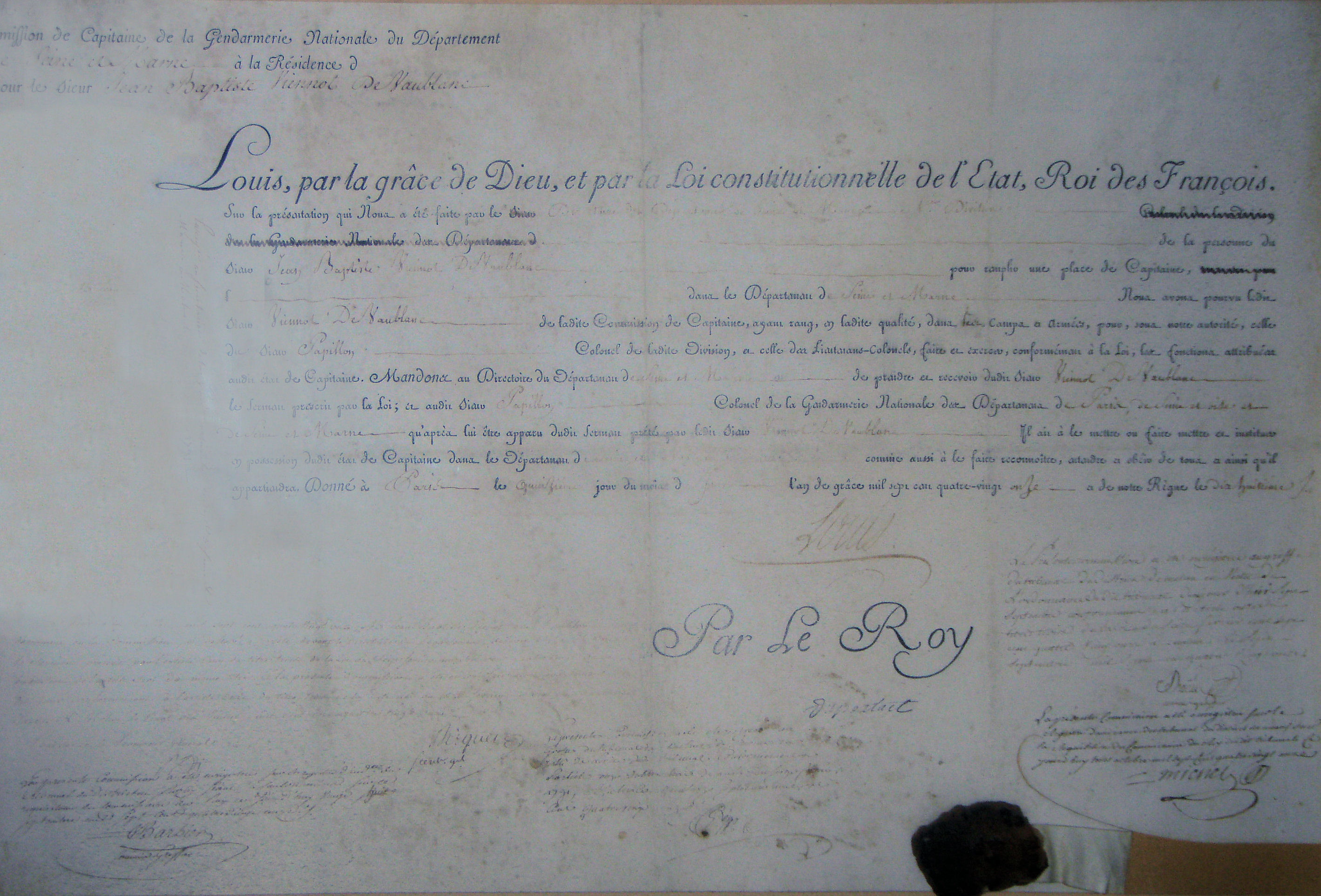 Diplôme de Capitaine de gendarmerie de Jean-Baptiste Viénot de Vaublanc